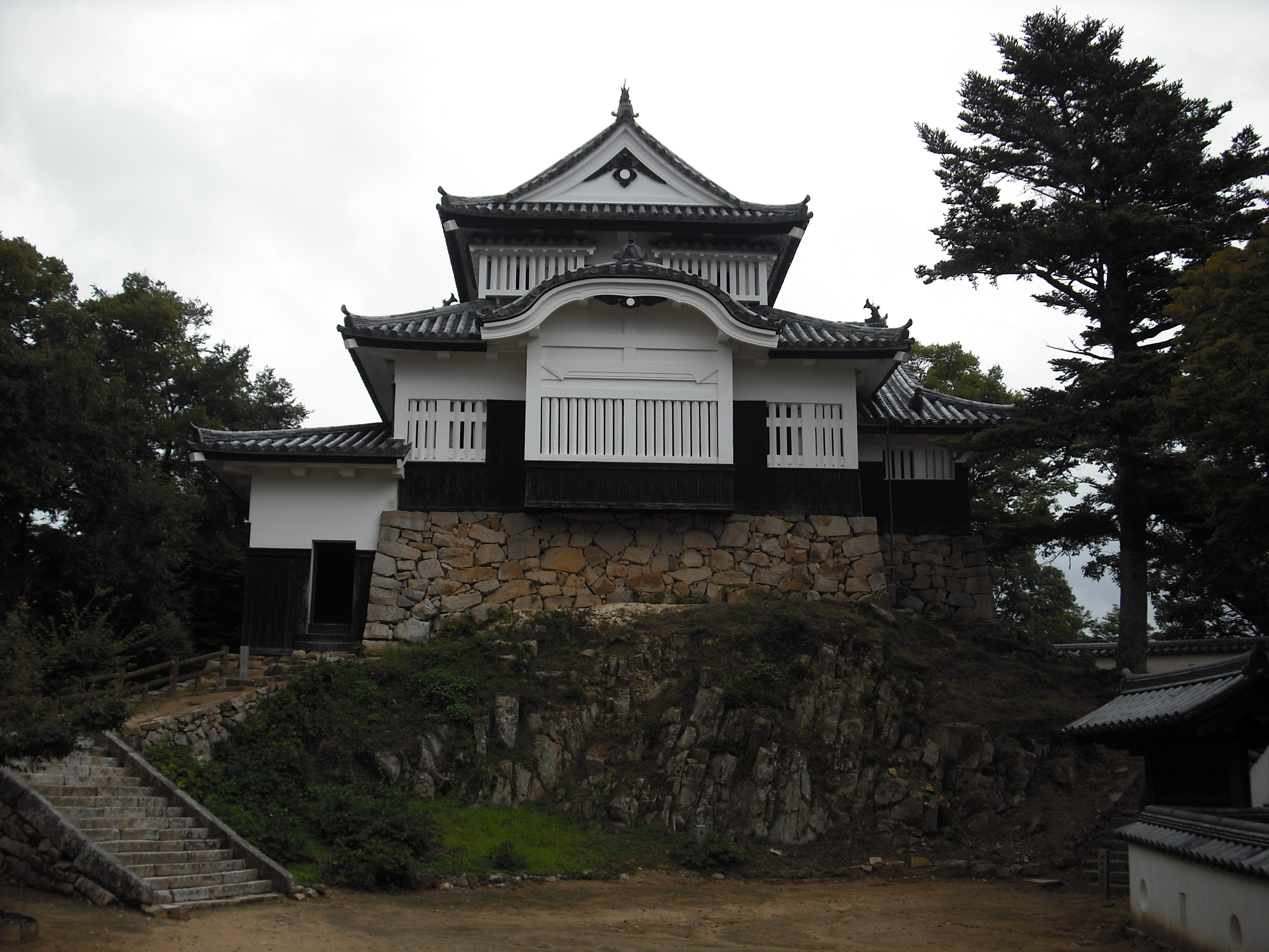 備中松山城 天守